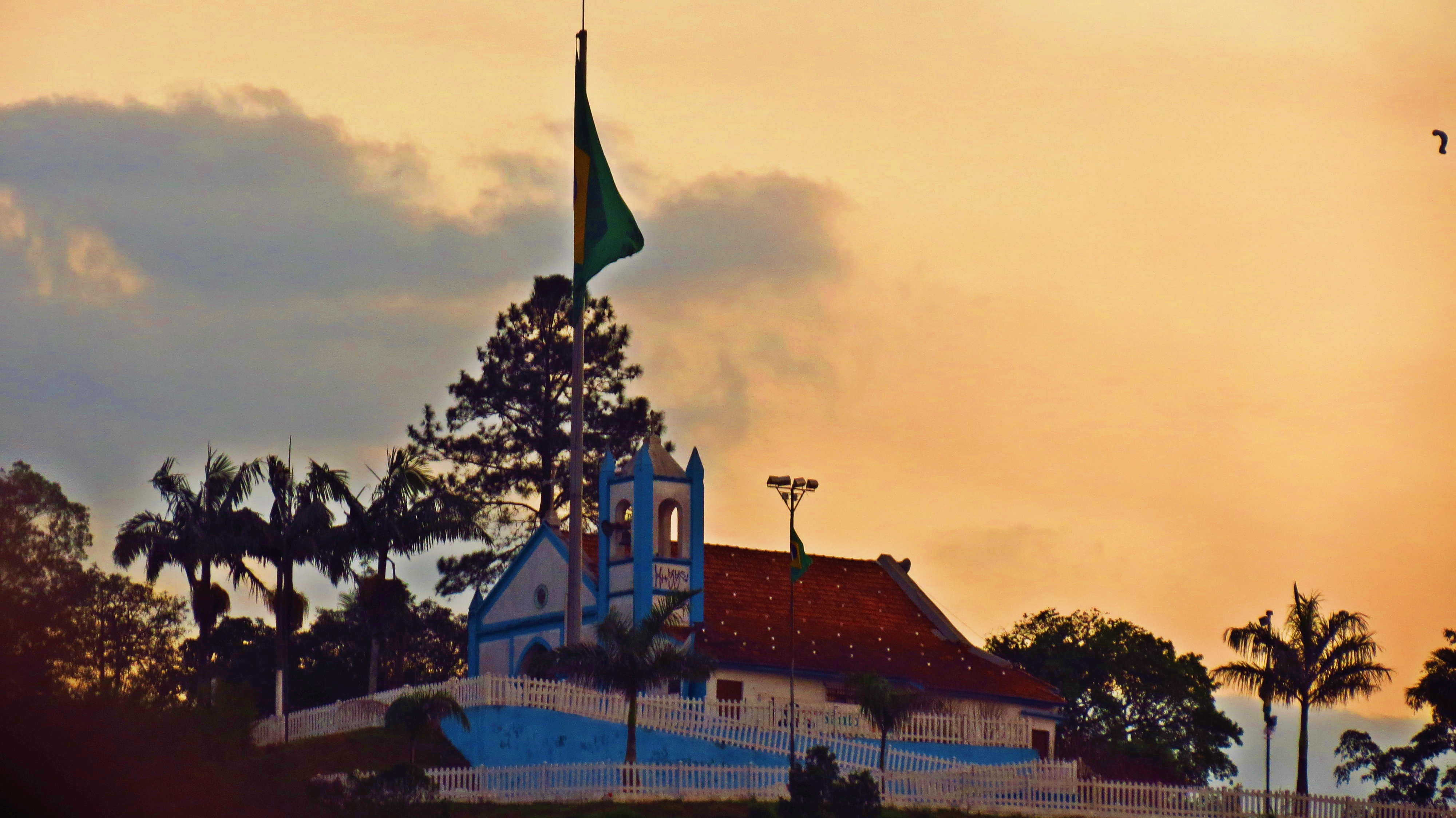 Morro de Santo Antônio